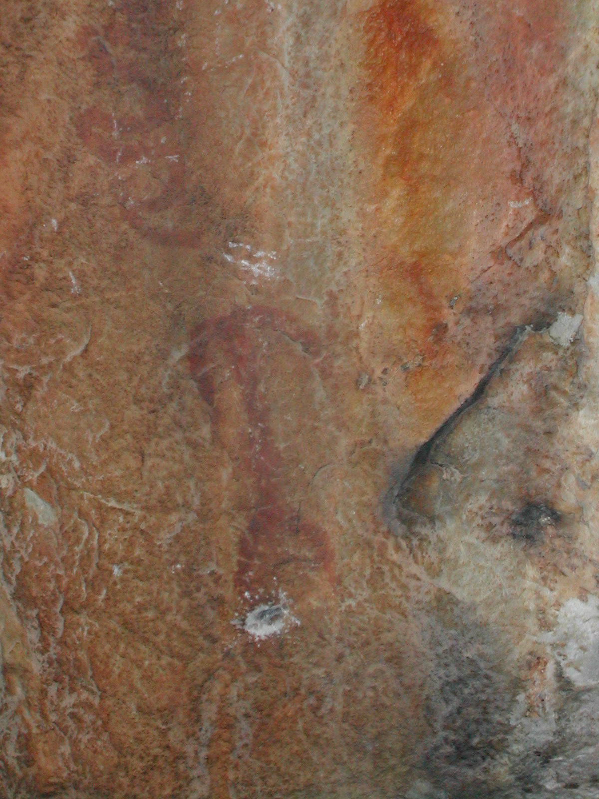 Gravura antropomórfica na Lapa dos Gaivões, Arronches